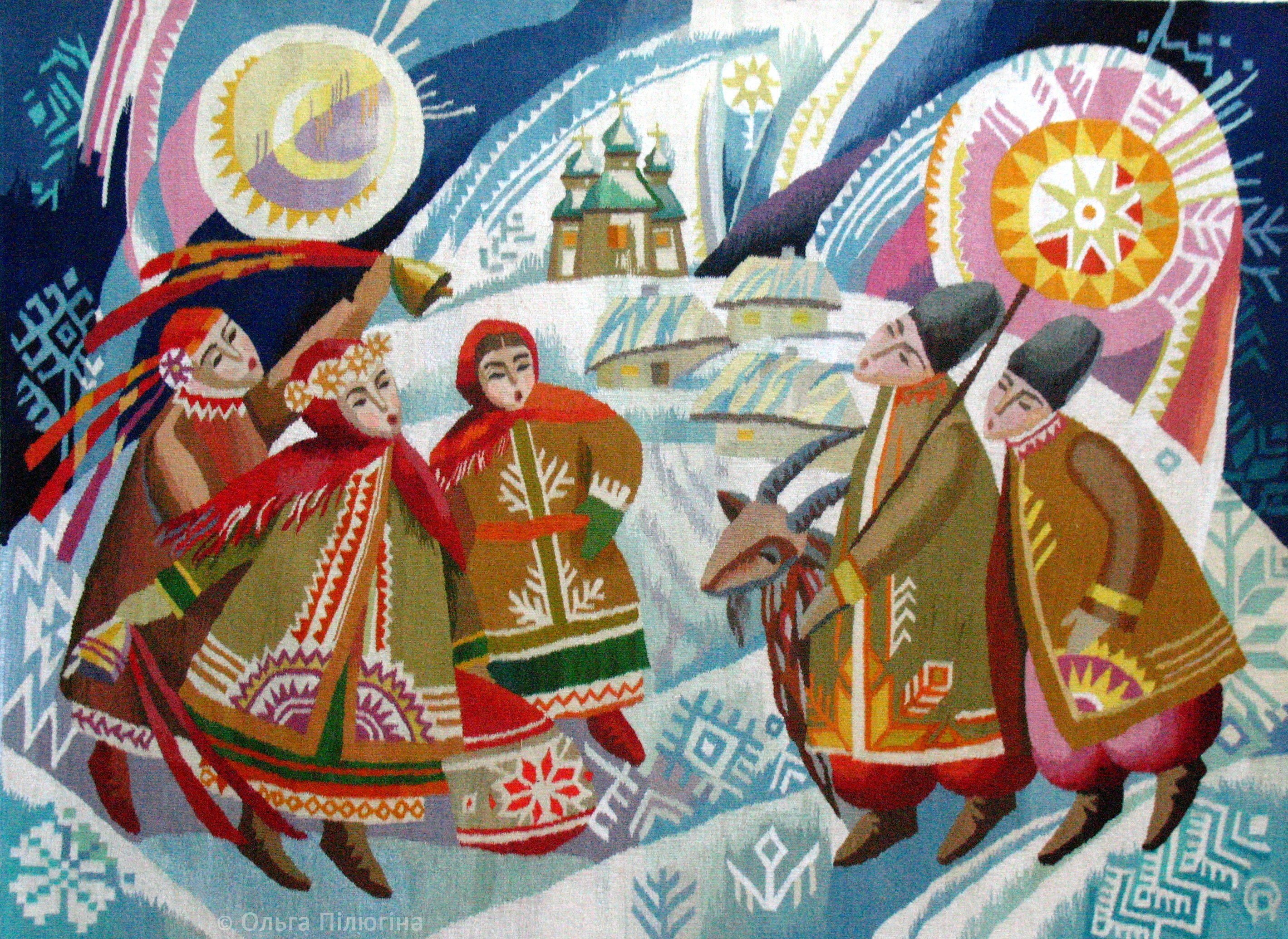 Авторський гобелен Ольги Пілюгіної "Коляда", 2008р. 120х165см.